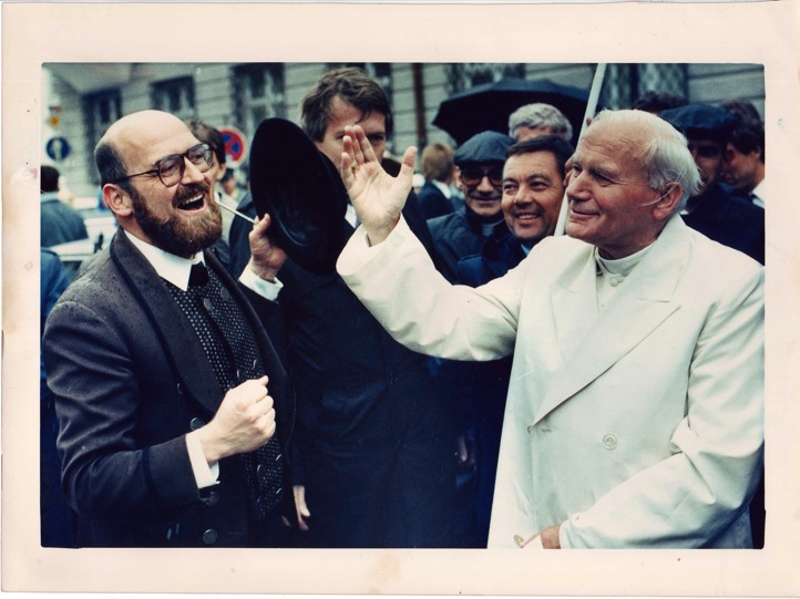 Treffen mit Papst, im Bild Reinhardt Reissner sowie Papst Paul, Bildeigentümer Reinhardt Reissner, Freigabe der Bildrechte durch Reinhardt Reissner an Wikipedia geschickt